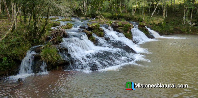 Salto Pepe en la localidad de Gobernador Lopez